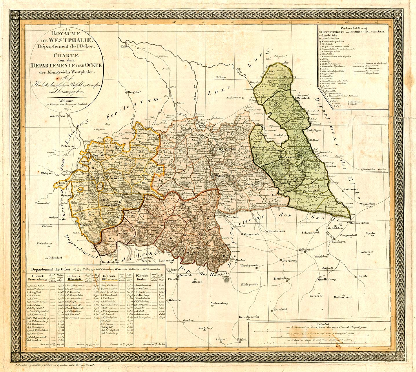 Charte von dem Departement der Oker des Königreichs Westpahlen